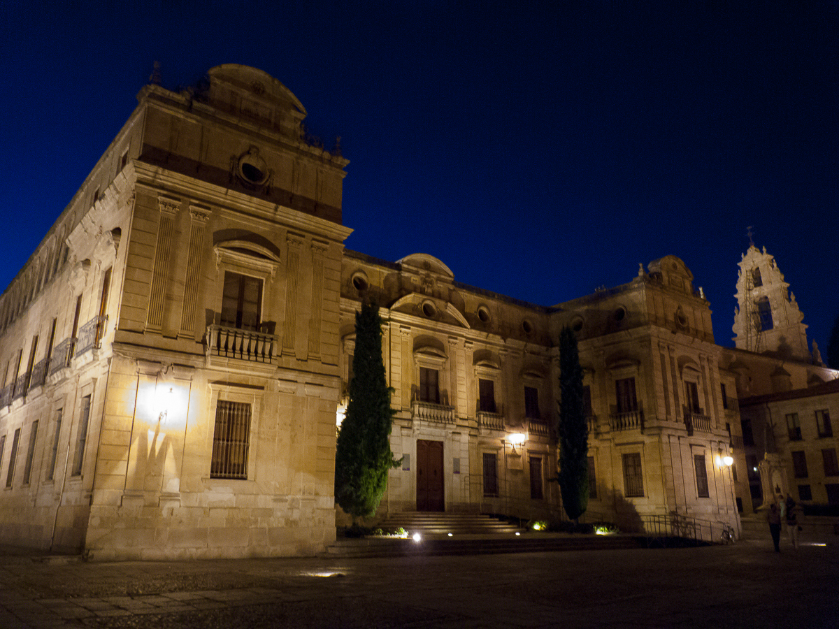 02082013 222524 SALAMANCA 0248